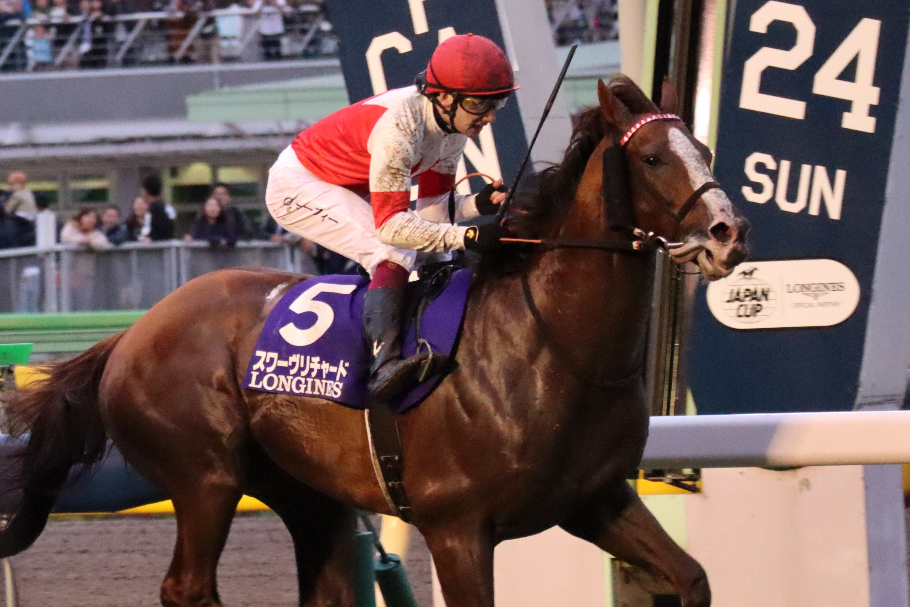 第39回ジャパンカップ優勝時